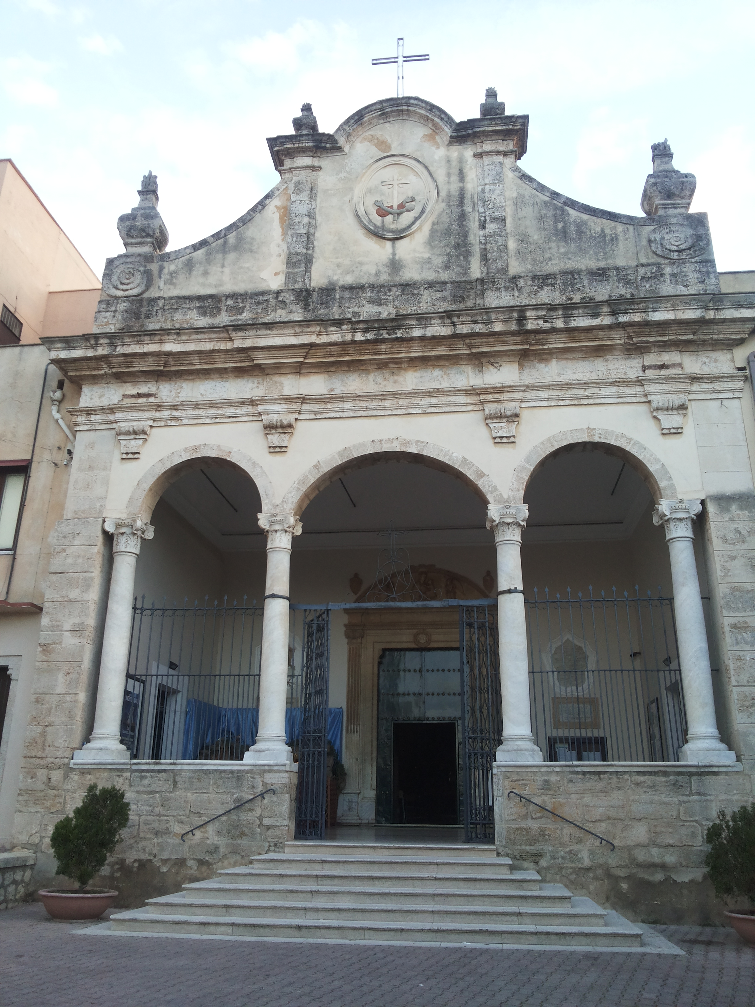 Chiesa Santa Maria del Gesù ad Alcamo